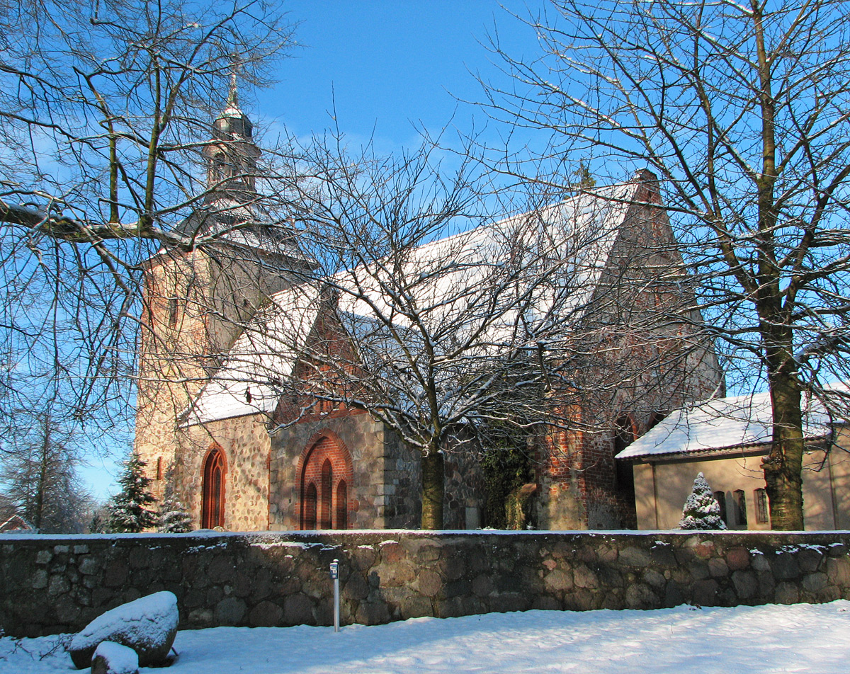 Beschreibung: Kirche Schlemmins Fotograf: Darkone, 17. Dezember 2005